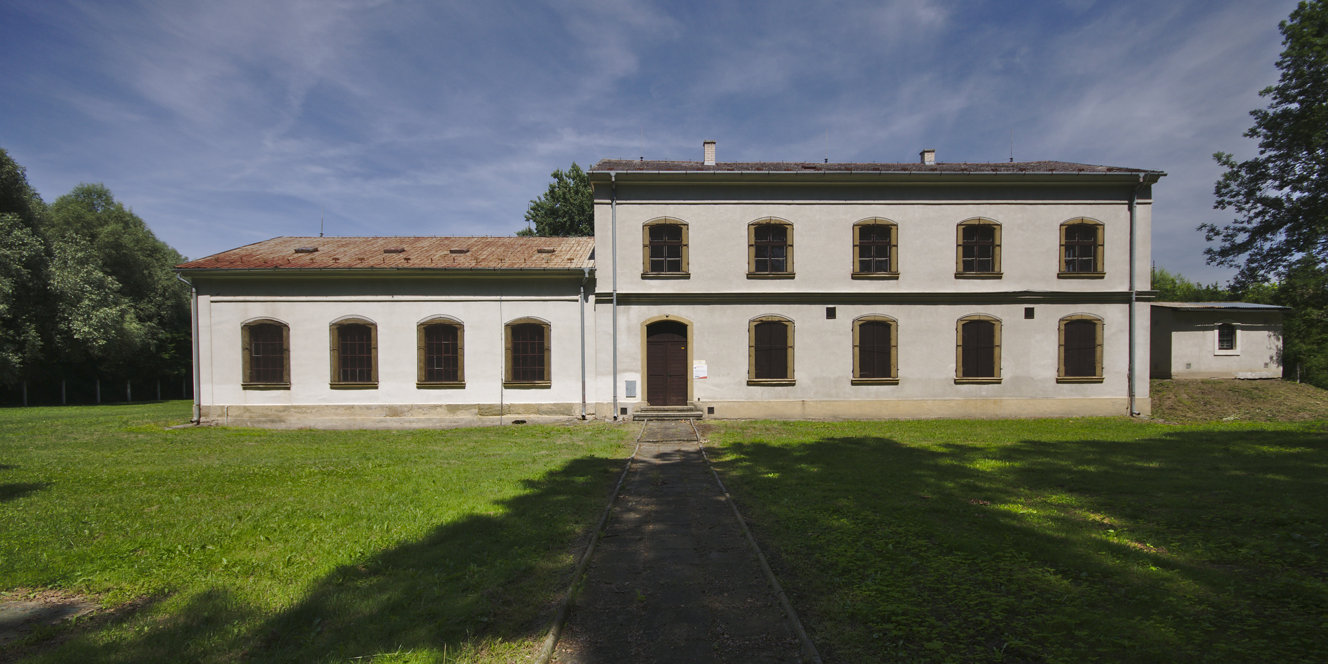 Parní vodárna, Chválkovice, Olomouc